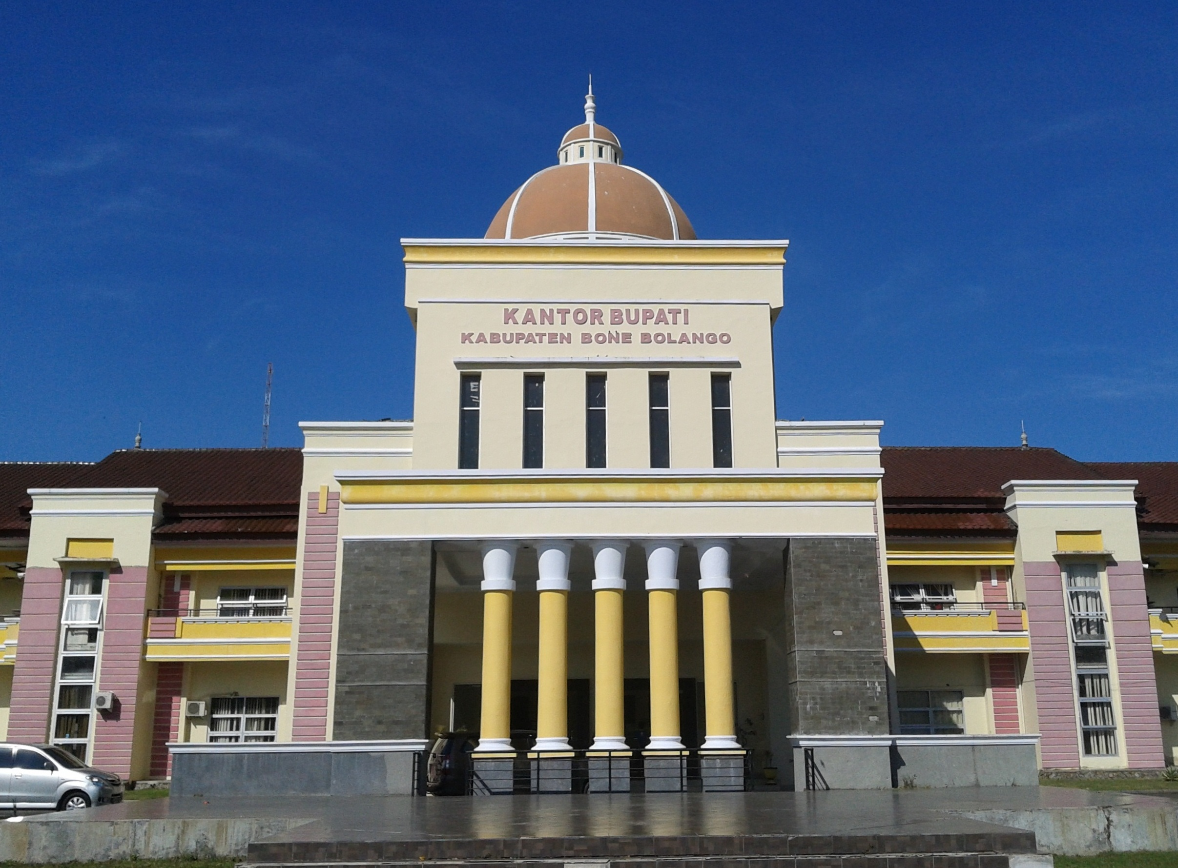 Kubah Gedung dan Pilar Depan Kantor Bupati Bone Bolango.